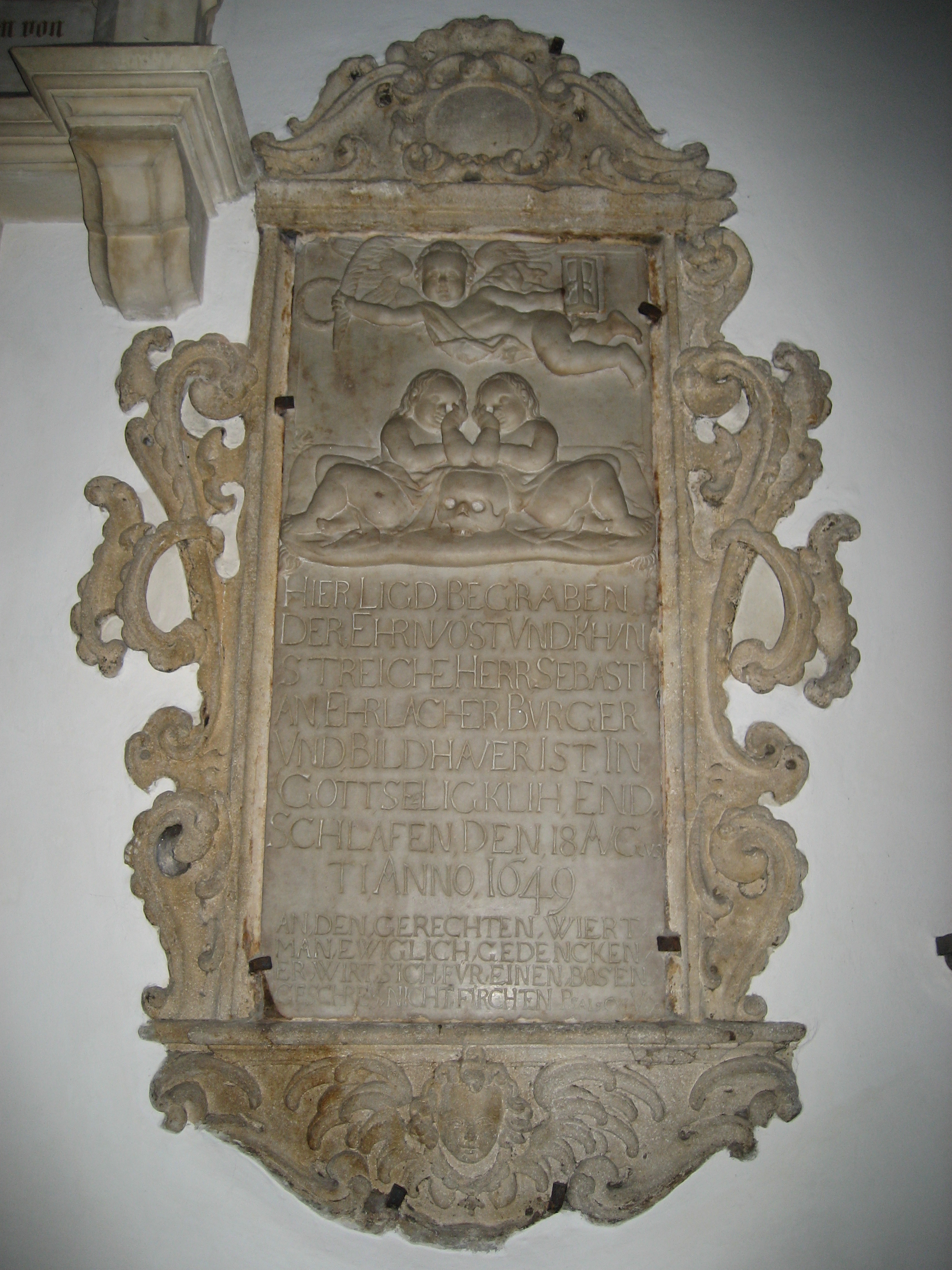 Stadtpfarrkirche Graz, Grazer Stadtpfarrkirche (Austria): Grab von Sebastian Erlacher; dessen Schüler (unter später Ehemann der Witwe Erlachers) Johann Baptist Vischer war der Vater von Johann Bernhard Fischer von Erlach, der sich nach dem hier Begrabenen "von Erlach" nannte.